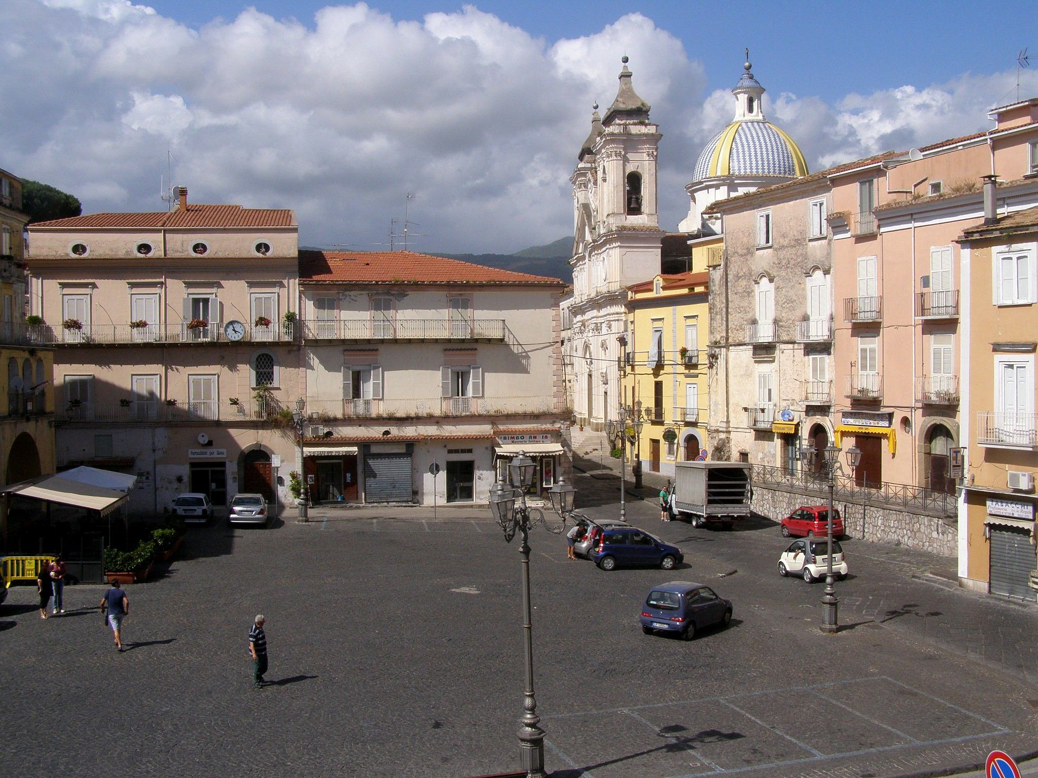 Centrálne námestie Piazza XX Settembre, vpravo Kostol San Eustachio